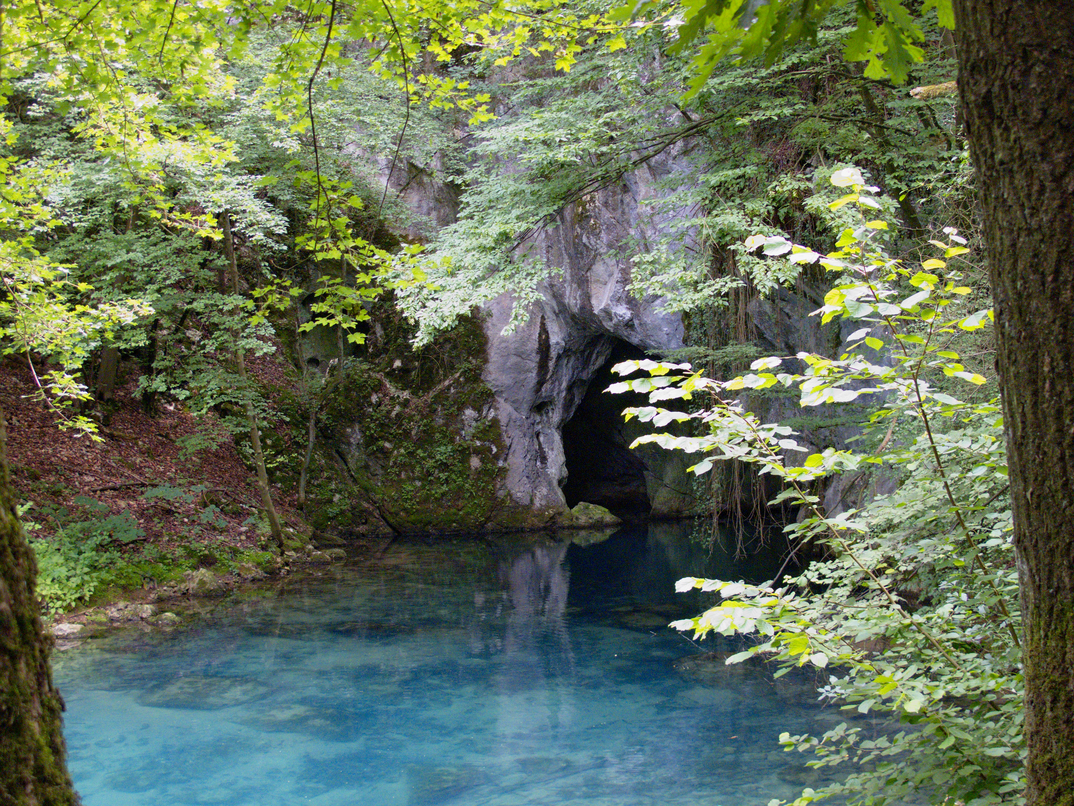 Ово је фотографија заштићеног природног добра у Србији под шифром: СП255 This is a a photo of a natural area in Serbia with ID: СП255 Споменик природе Крупајско врело